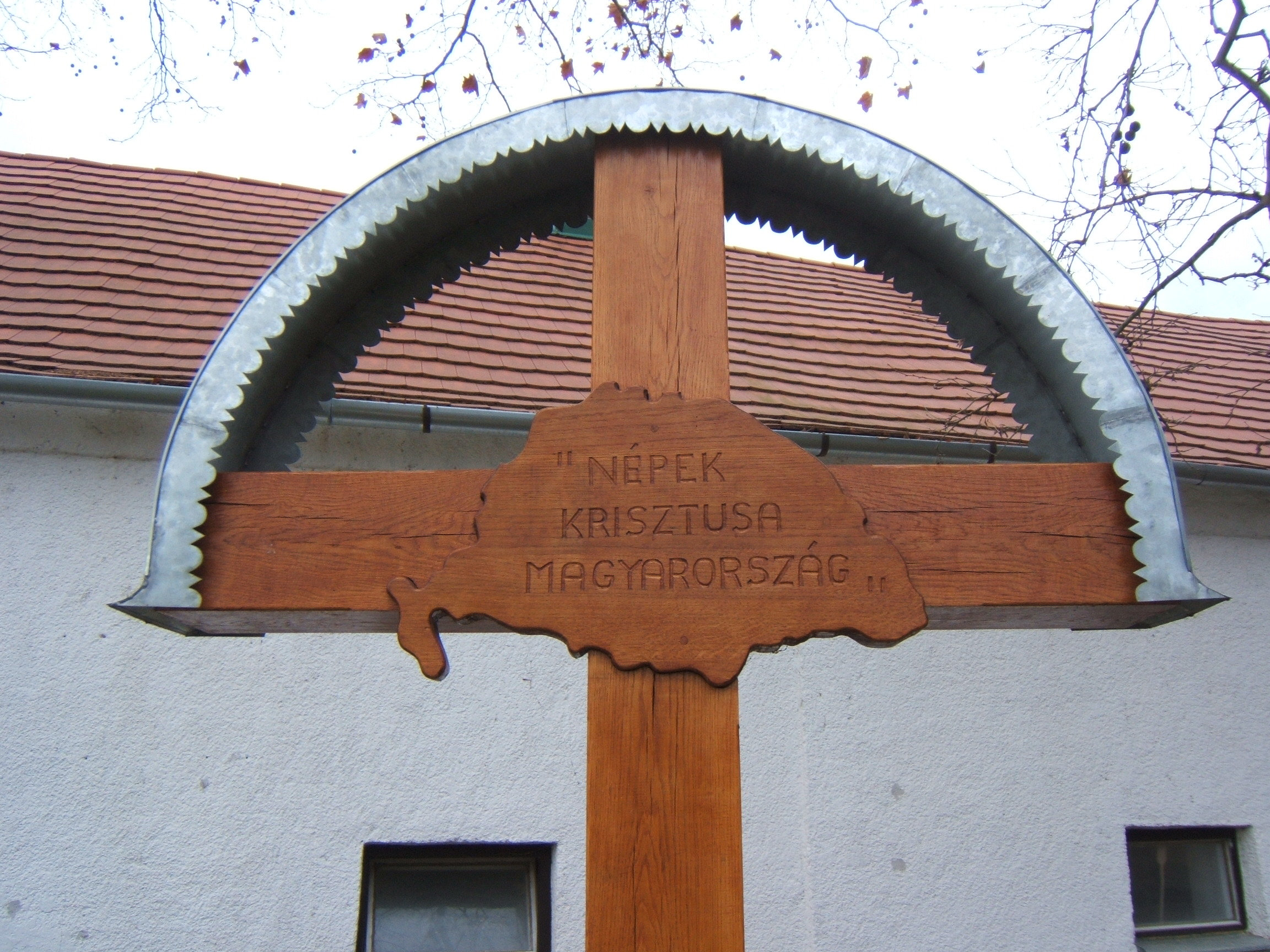 Abaliget, Trianon-emlékmű